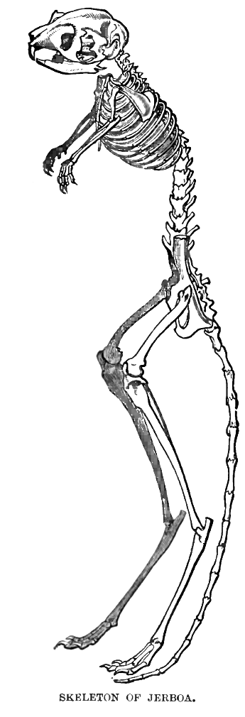 Skeleton of Jerboa